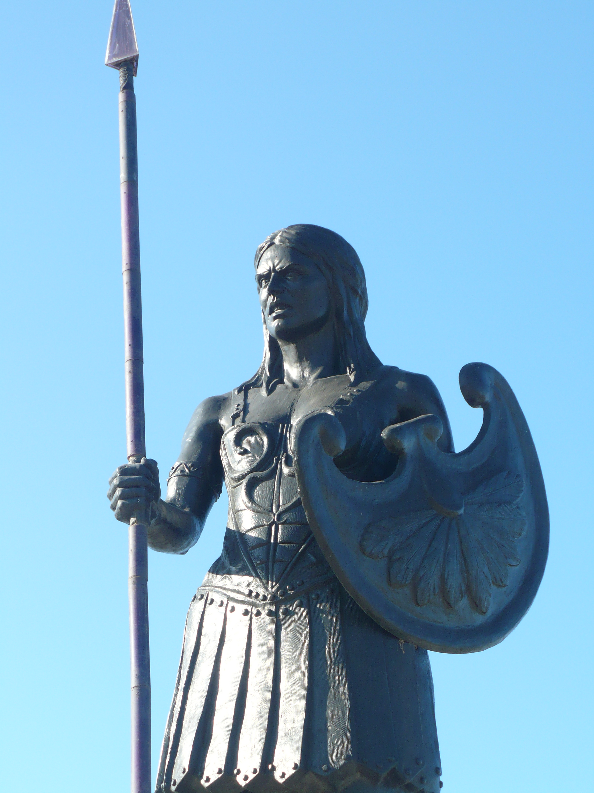 Samsun'dan çeşitli görüntüler